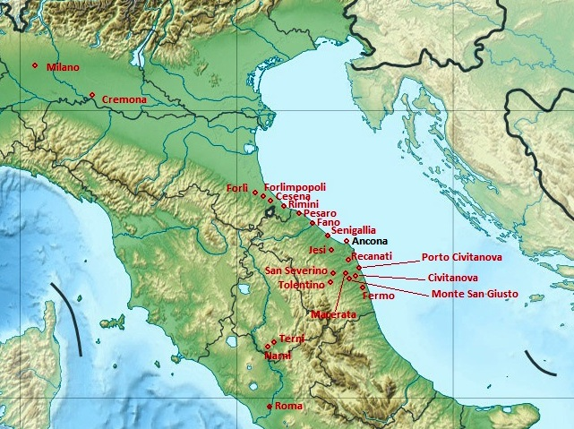 La carta descrive l'estensione della Rivolta dei Bersaglieri da Ancona, nella quale era scoppiata, al Nord e al centro d'Italia. Per motivi di spazio non sono riportate le città che aderirono alla rivolta situate nei pressi di Ancona.